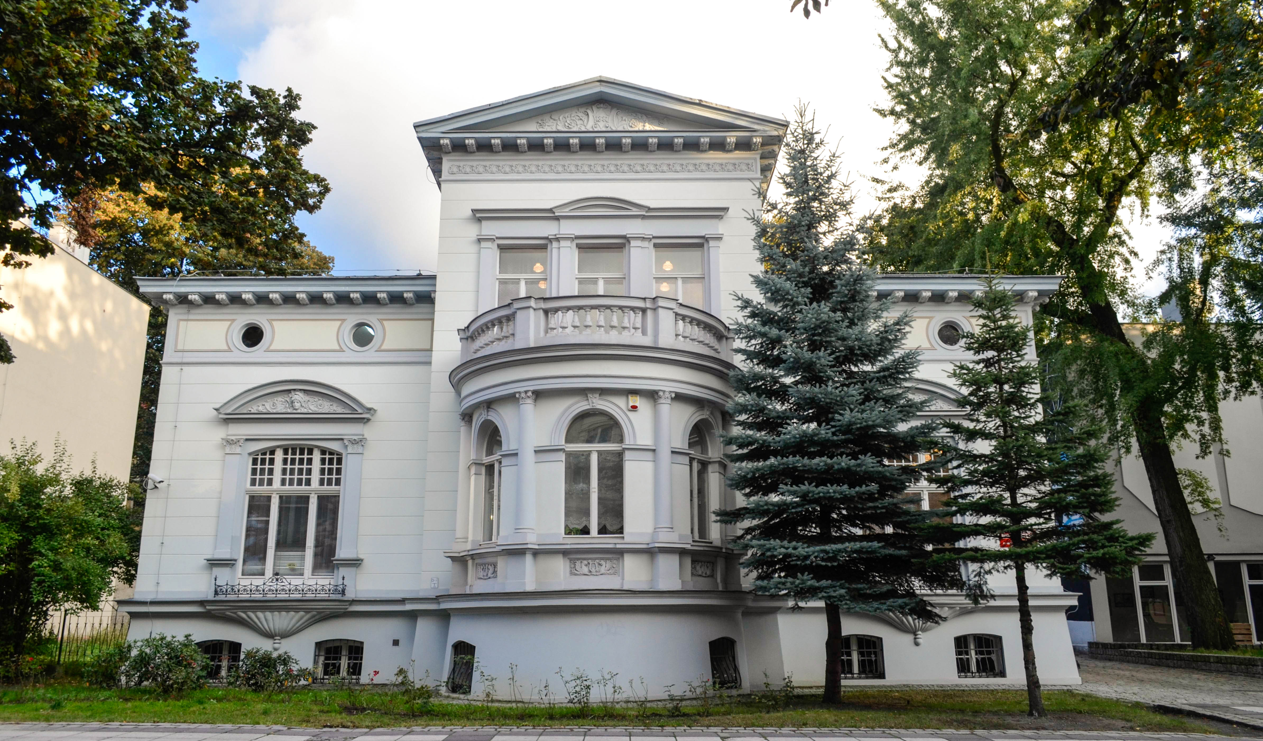 Zielona Góra, dom, 1887